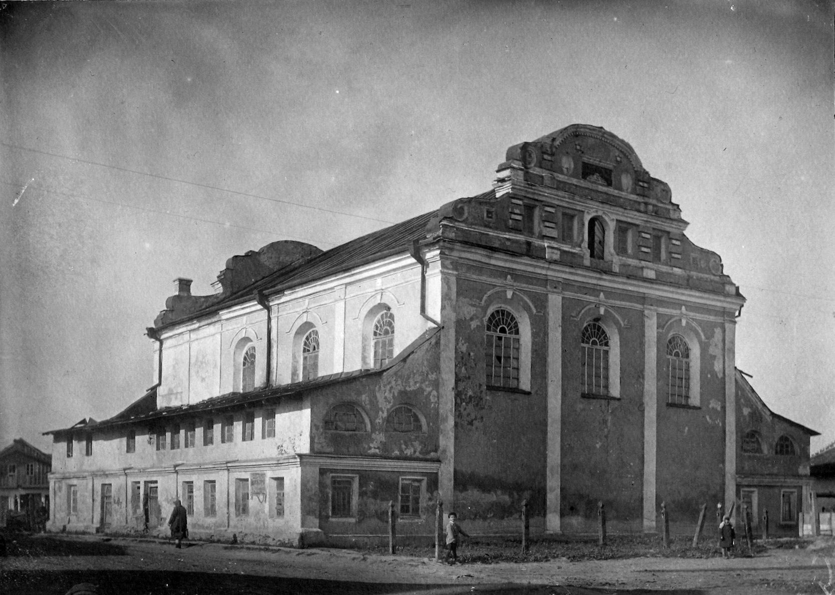 Синагога в Баре, архивное фото экспедиции П. Жолтовского.